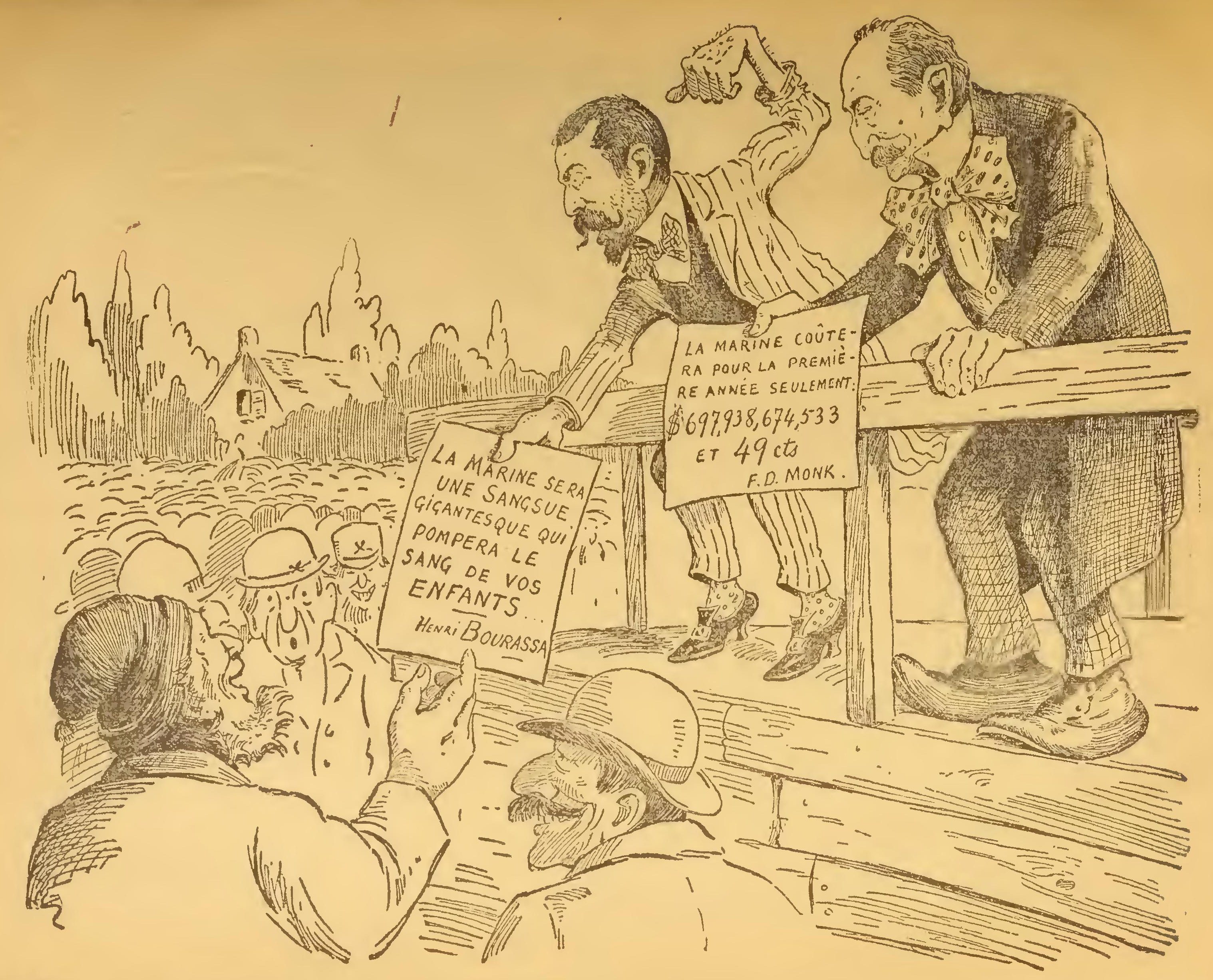 Caricatures incluses dans la publication